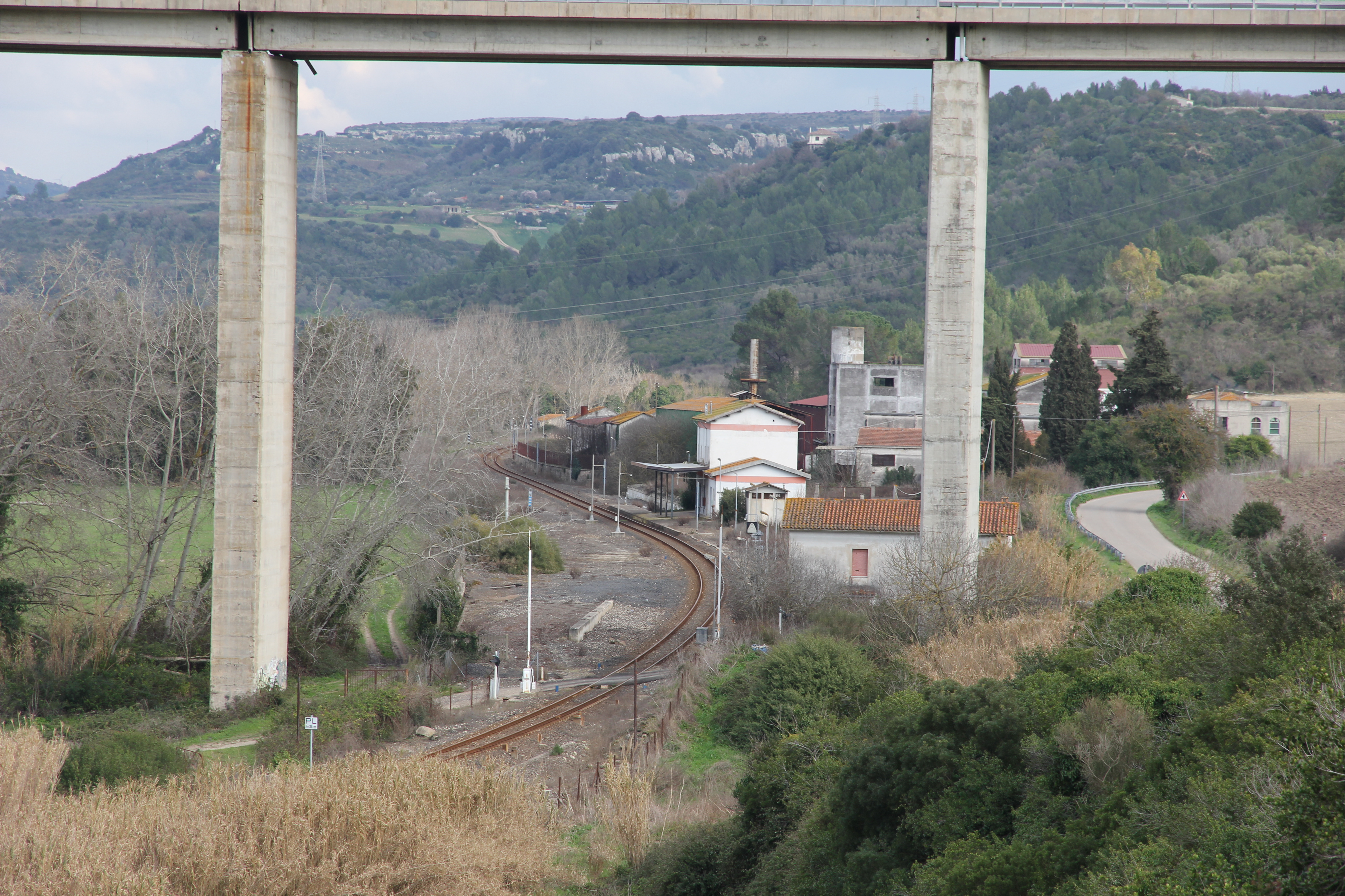 Stazione ferroviaria di Tissi-Usini - Viadotto del Mascari (SP 15)